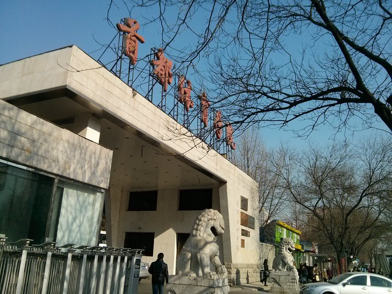 首都体育学院